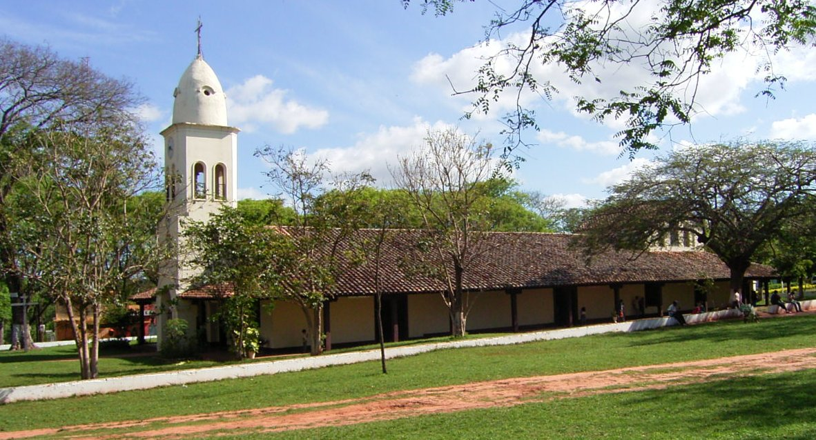 selbst gemacht am 29.10.2005